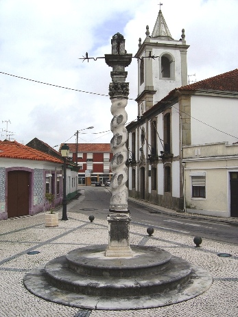 Esta imagem é de minha autoria e é para ser colocada,sem qualque limitação de uso, na página referente à descrição sobre o Pelourinho de Esgueira, página que foi editada, também, por mim.